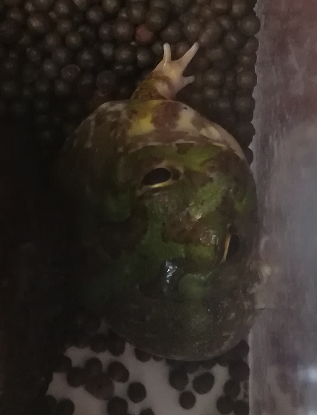 相模川ふれあい科学館の企画展で展示されていた、チャコガエルの個体(現在は終了しています。)